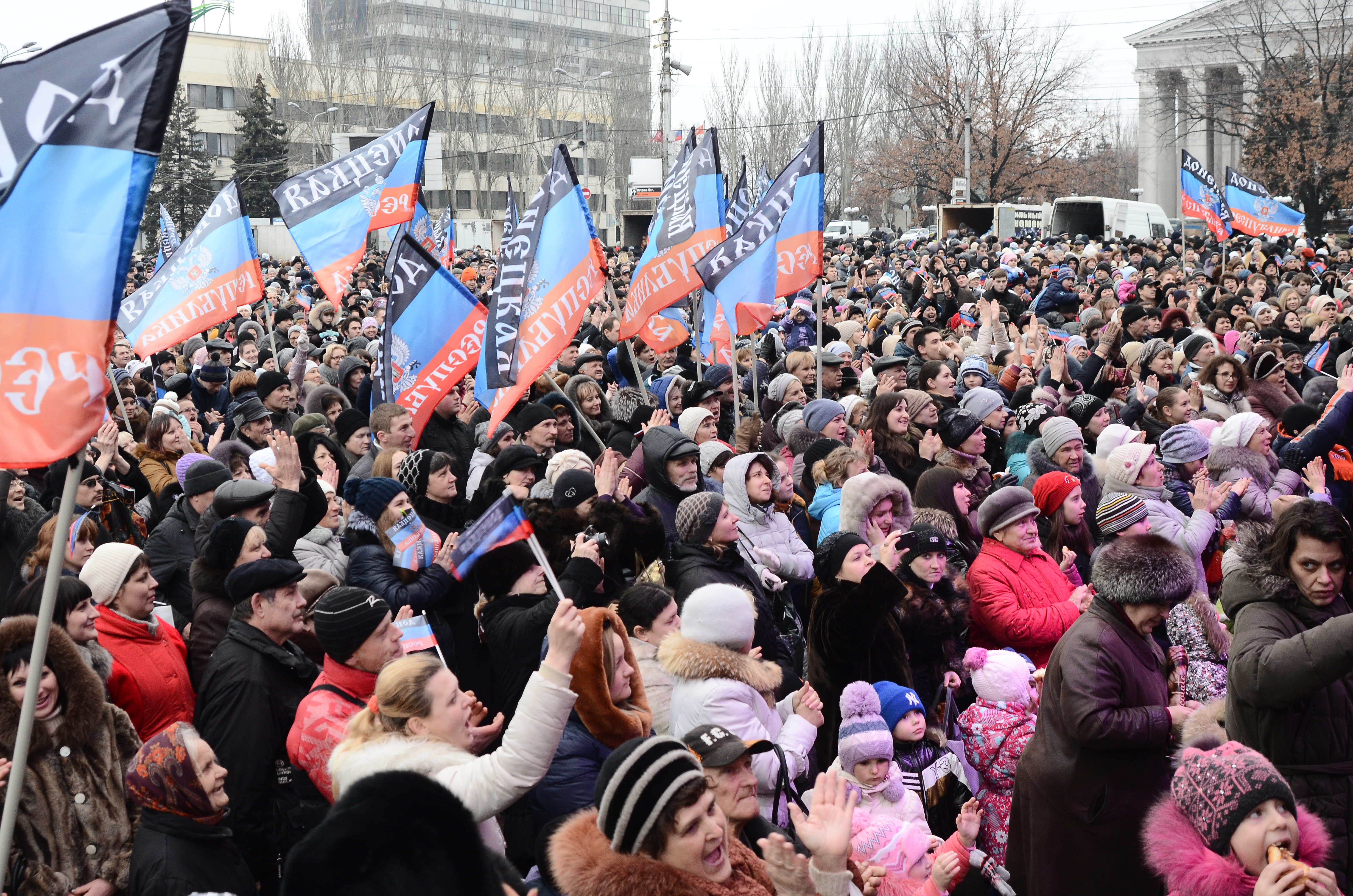 Праздник солидарности в Донецке